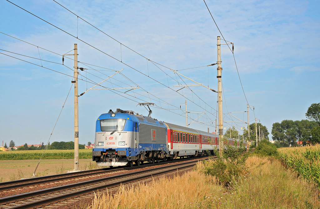 Lokomotiva 380.003 při vůbec prvním mezinárodním výkonu řady 380 u Velimi na Ex 121 "Košičan"